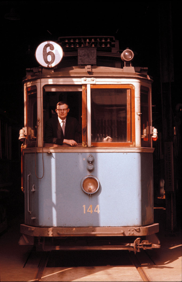 Fotografen Håkan Trapp i en spårvagn.